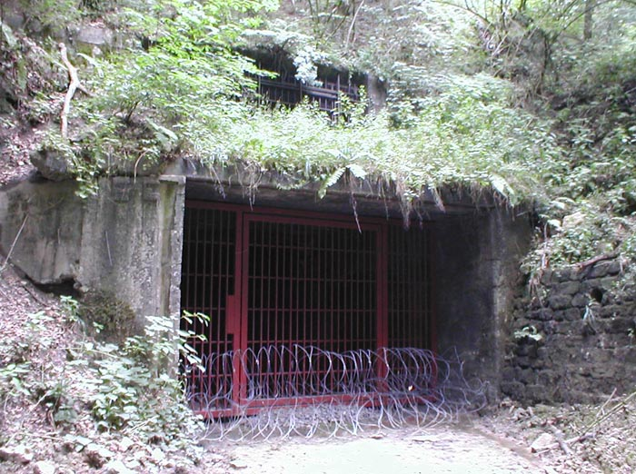 Eingang zum Schacht "Brasse" bei Obrigheim, unterirdische Rüstungsanlage 1944-45, Teil des Außenlager Neckarelz des KZ Natzweiler.